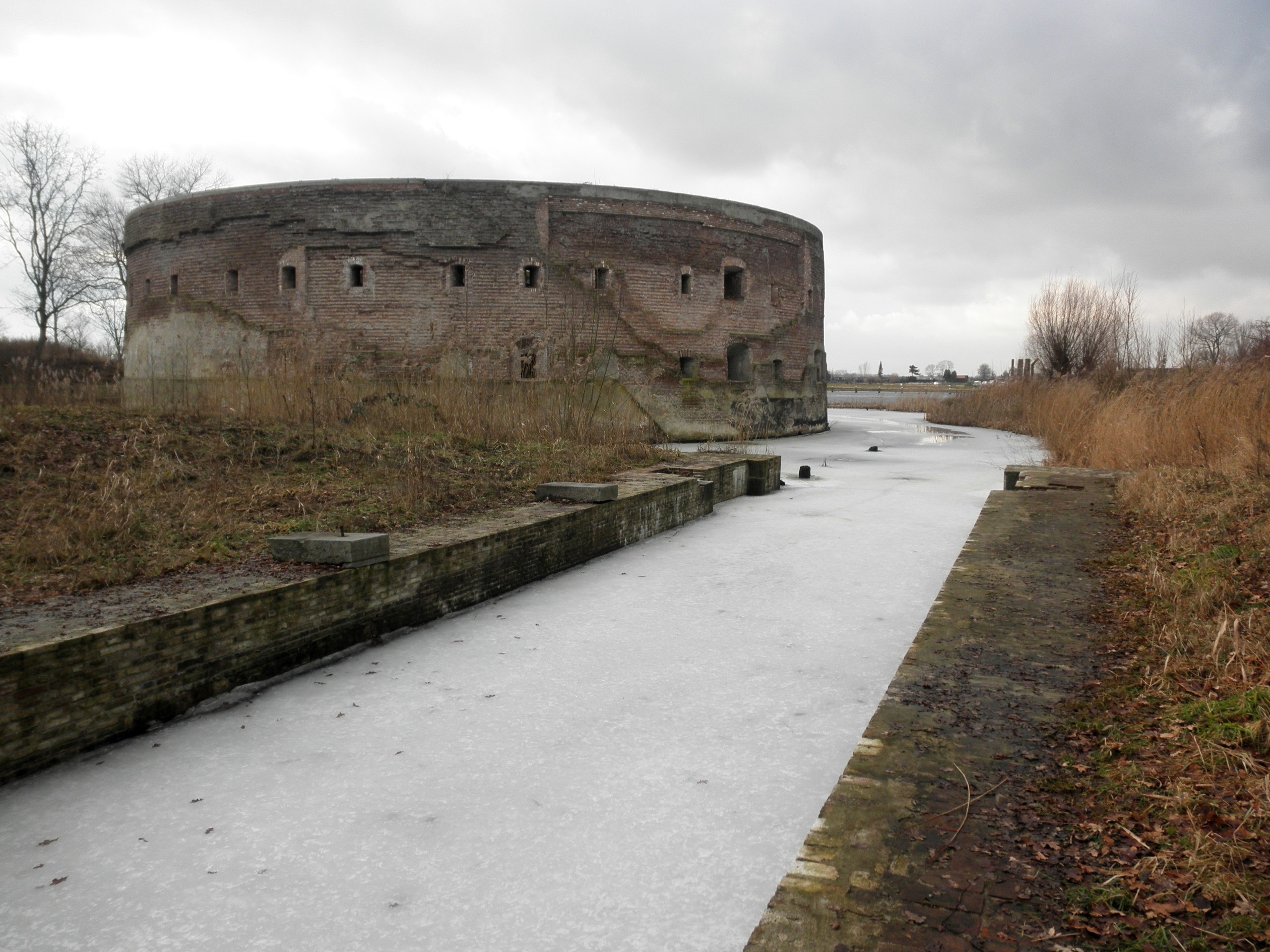 Torenfort van Fort Uitermeer met een deel van de oude sluis. De gracht en de oude sluis zijn in 2009 weer ontgraven. De foto is gemaakt richting Weesp.